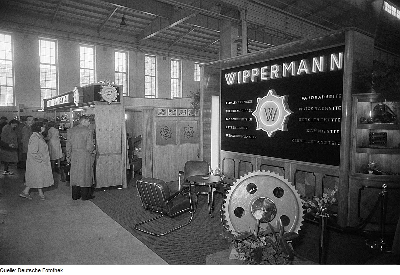 Original image description from the Deutsche Fotothek Exponate der Leipziger Herbstmesse 1954